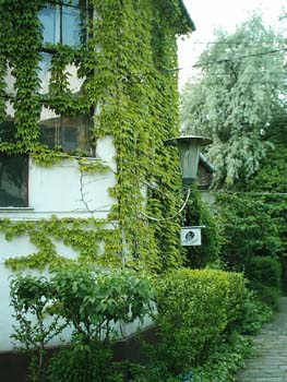 Százados úti művésztelep Art Colony in Budapest